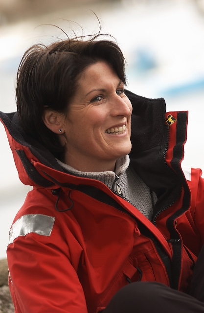 Crédit photo Bernard Galéron